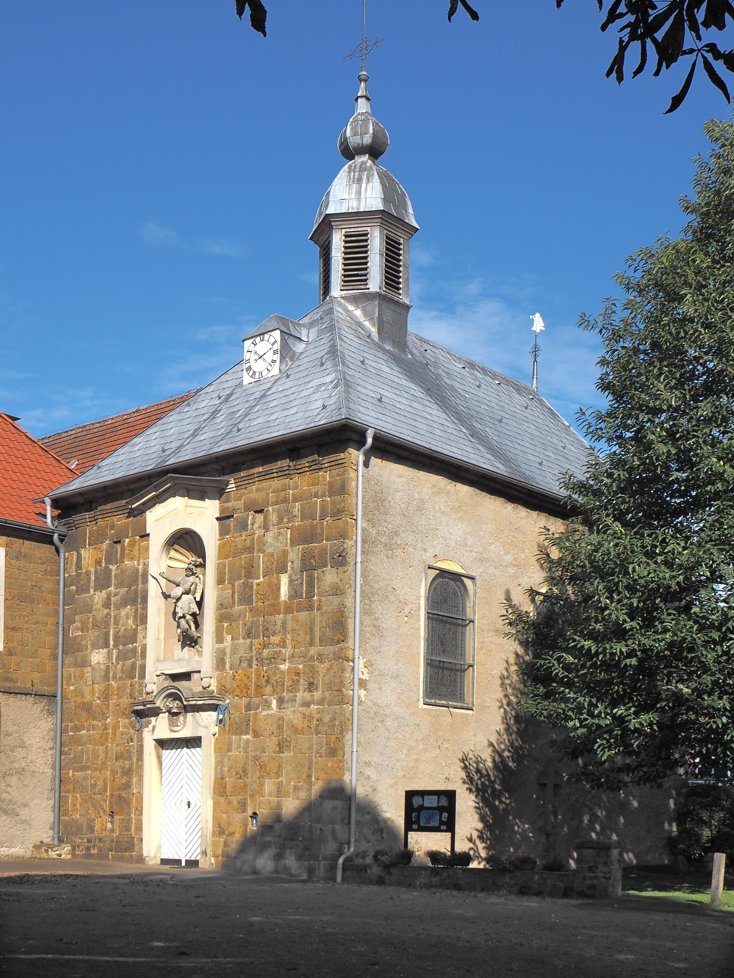 Dorsten-Lembeck , Ehem. Kloster der Karmeliterinnen, ursprünlich Witwensitz der Baronin von Westerholt